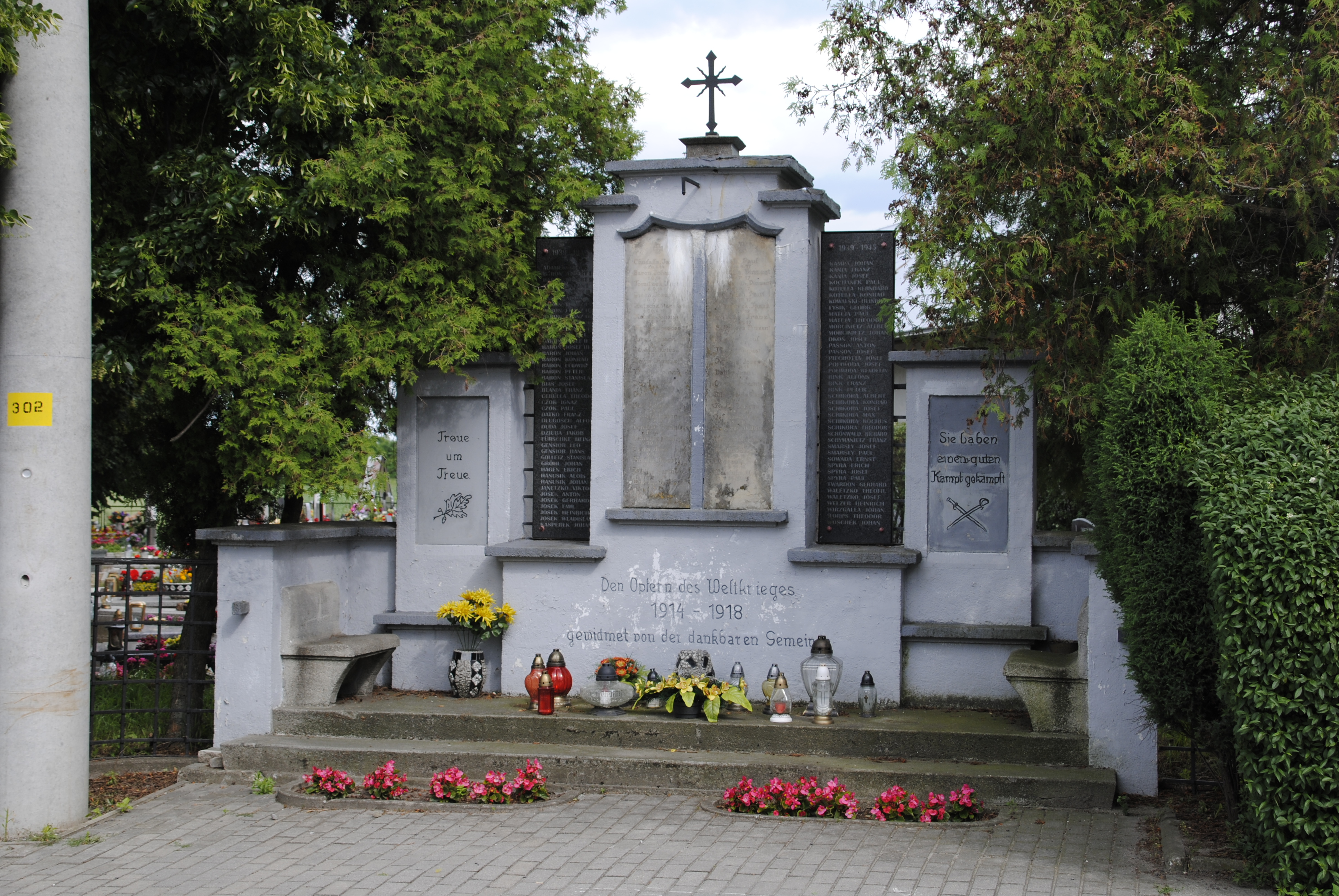 Denkmal für die Gefallenen der beiden Weltkriege in Oppeln-Vogtsdorf